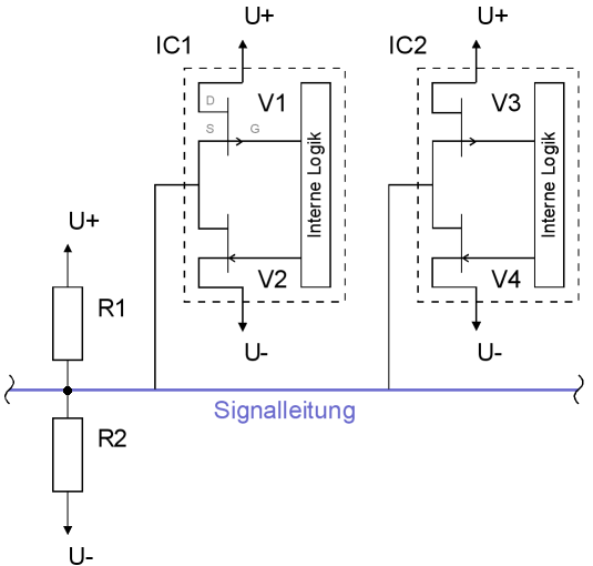 Pull-Up-Down+Tristate (Original text: Pull-Up-Down+Tristate. Ein bewusst stark vereinfachter Schaltplan, der eine grundsätzliche Tristate-Ausgangsbeschaltung zusammen mit je einem Pull-Up- und Pull-Down-Widerstand darstellt.) Technischer Hintergrund: Beide Bauteile IC1 und IC2 können auf der selben Datenleitung arbeiten weil sie ihre Ausgänge "hochohmig" schalten können. In diesem Zustand sind jeweils beide Transistoren (V1 und V2 sowie V3 und V4 einfache FET) "zu" und das Potential wird nur durch andere Ausgänge bestimmt. Ist gar kein Ausgang aktiv bestimmen die Widerstände R1 und R2 den Pegel auf der Signal-Leitung. Irgendwo (nicht im Bild) sollte freilich noch ein Eingang sein, der an der Leitung hängt. Prinzipiell kann es beliebig viele Ausgänge vom Typ IC1 und IC2 geben. Natürlich muss das Aktivieren und Deaktivieren der Ausgänge von einer weiteren Logik koordiniert werden. Aber für das Schema wollte ich nicht zuviel hineinpacken.